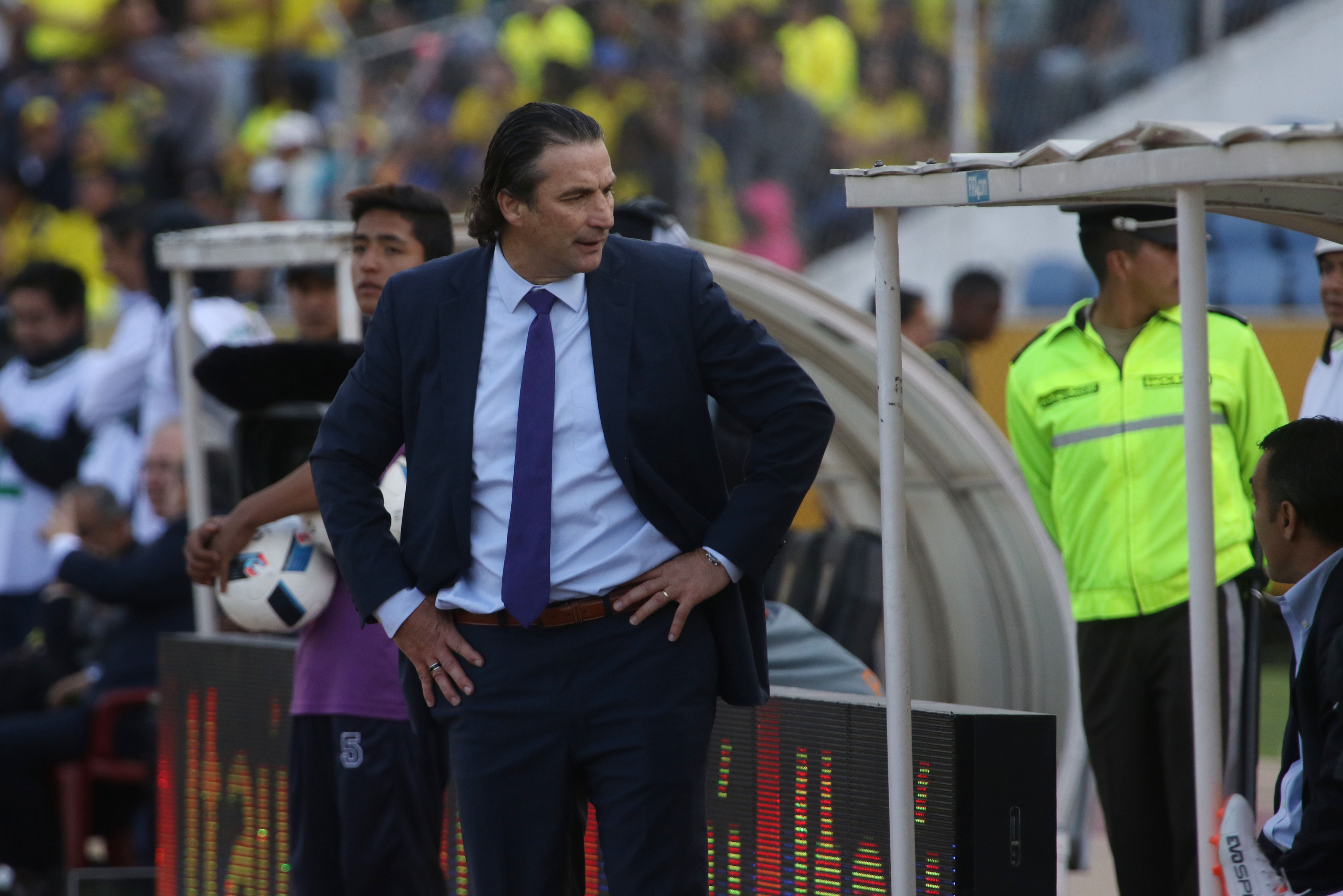 Quito, 6 oct (Andes).- Ecuador (amarillo) volvió a mostrar la imagen que lo llevó a ganar los primeros cuatro partidos en seguidilla de las Eliminatorias al Mundial Rusia 2018 y con algunas variantes se impuso por 3-0 a Chile en el estadio Olímpico Atahualpa de Quito.ANDES/Micaela Ayala V.